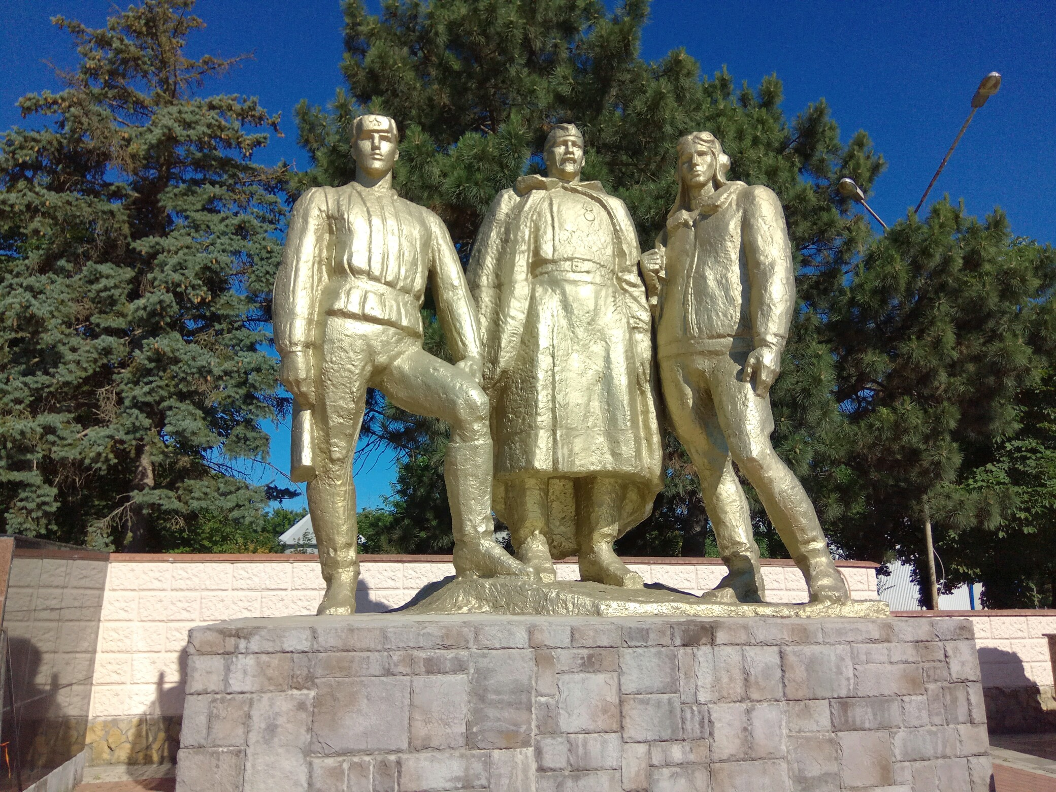 Мемориал у Вечного огня в память о погибших в Великой Отечественной войне в станице Тбилисской Краснодарского края